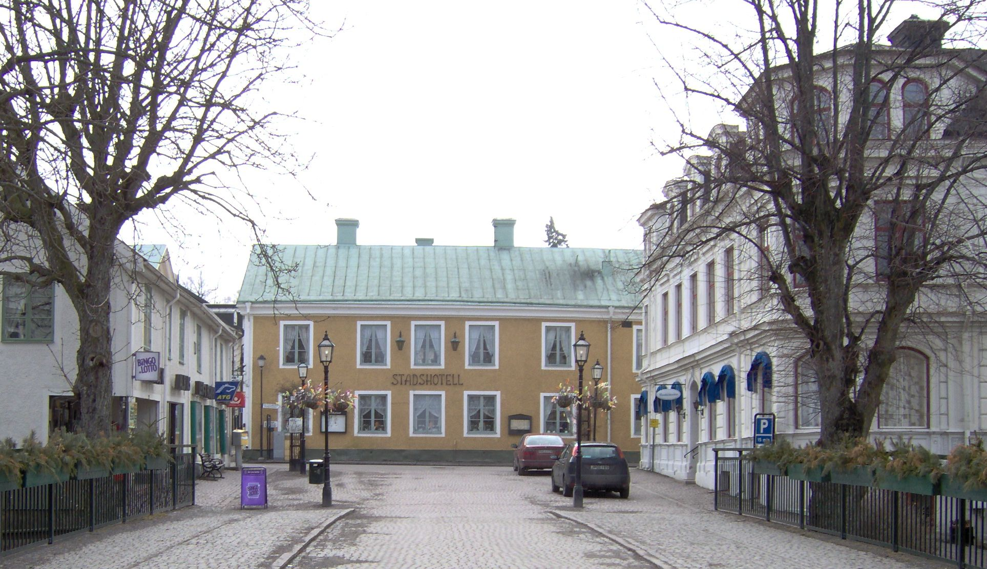 Trosa Stadshotell, påsken 2006.